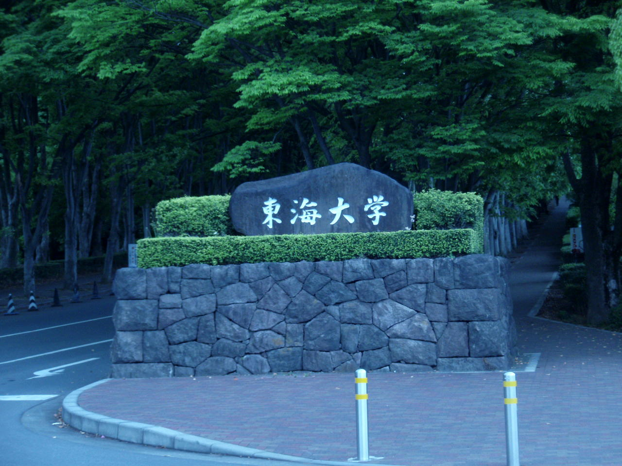 Tokai Univ. Shonan Campus Main Front gate